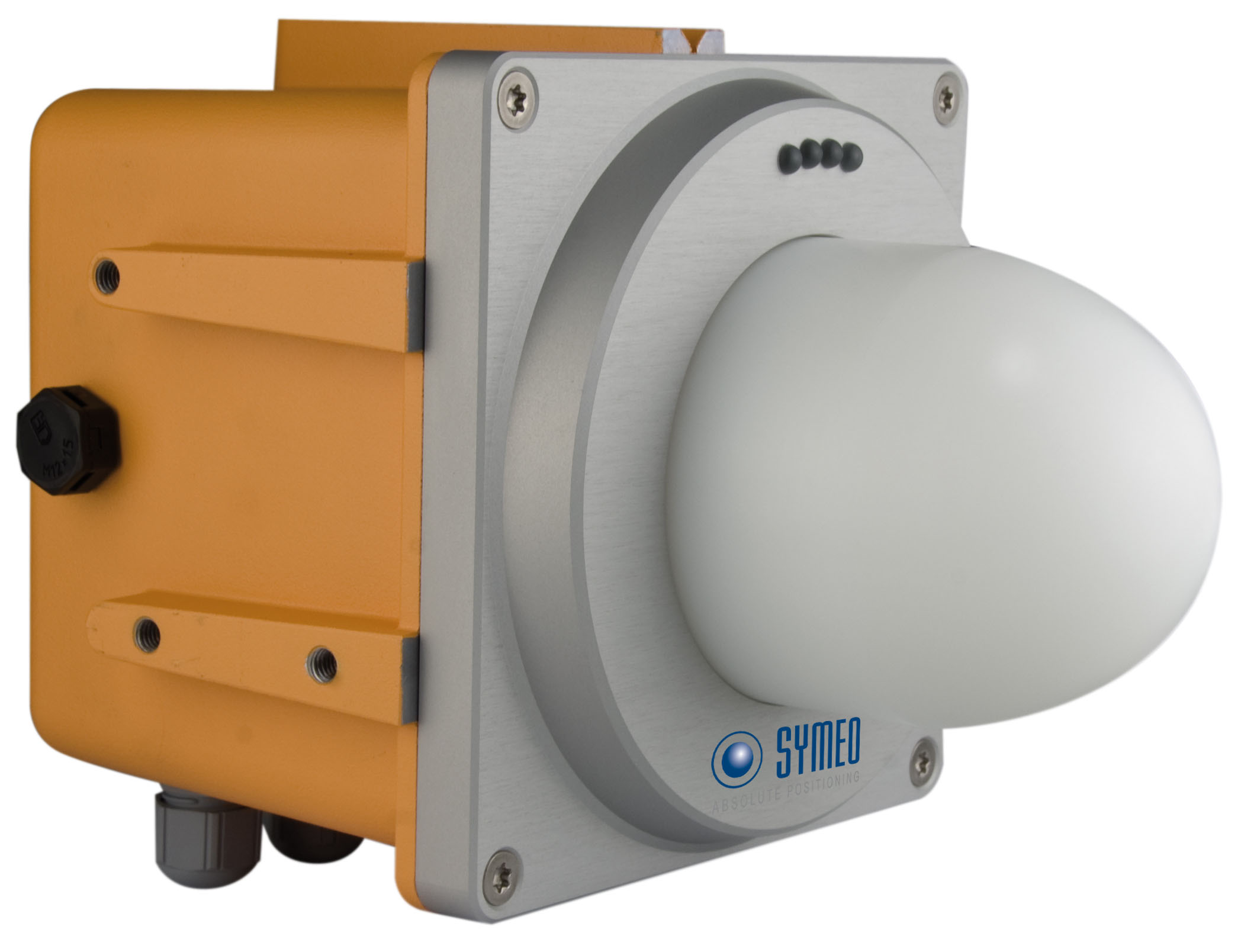 Symeo Industrielles Distanzradar Symeo LPR 1DHP 61 GHz FMCW Radar Frequenzbereich: 61 GHz - 61,5 GHz; FMCW-Modulation; 20dBm Sendeleistung EIRP